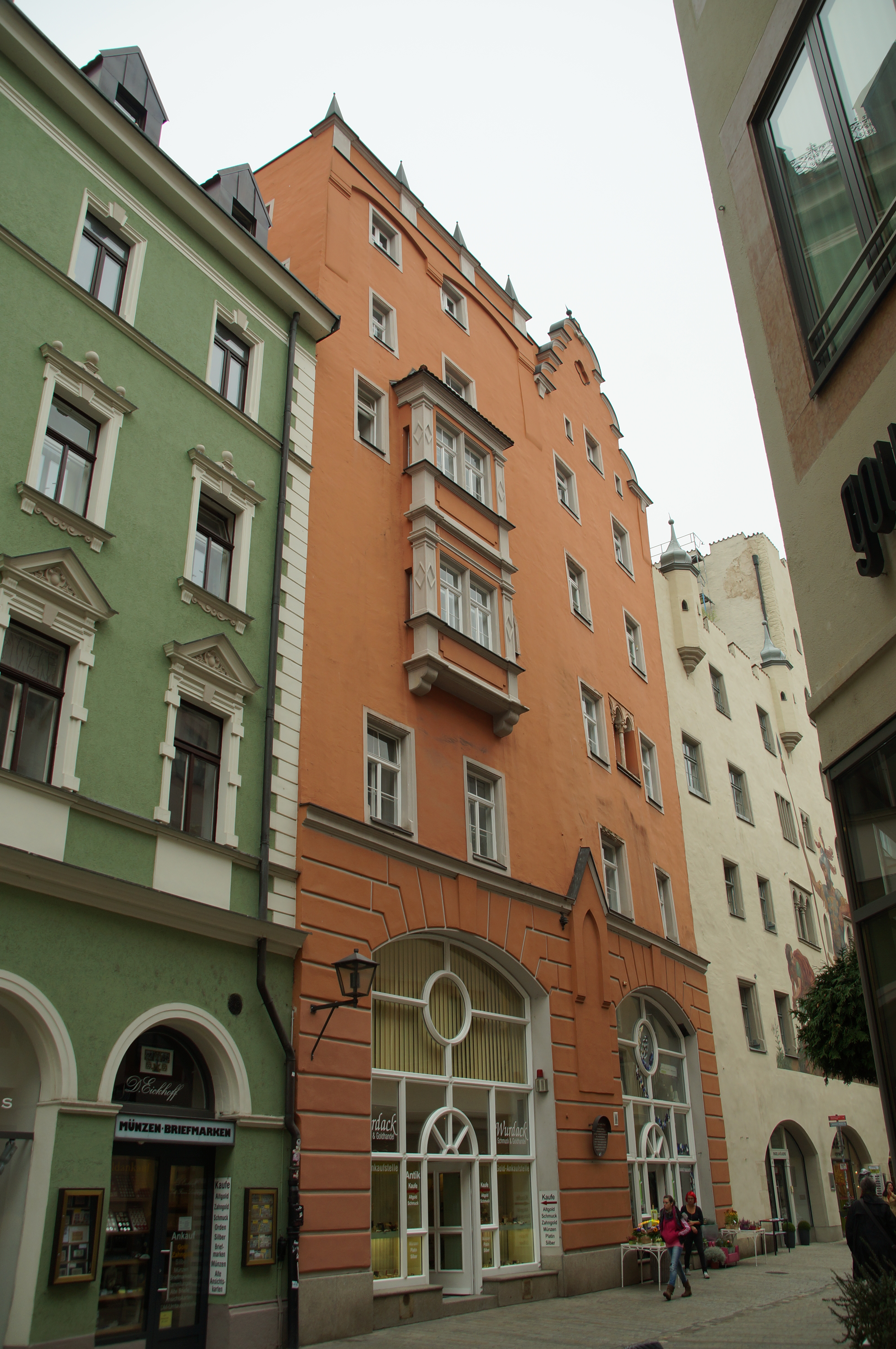 Steuer´sches Haus, Front zur GoliathstraßeThis is a photograph of an architectural monument.